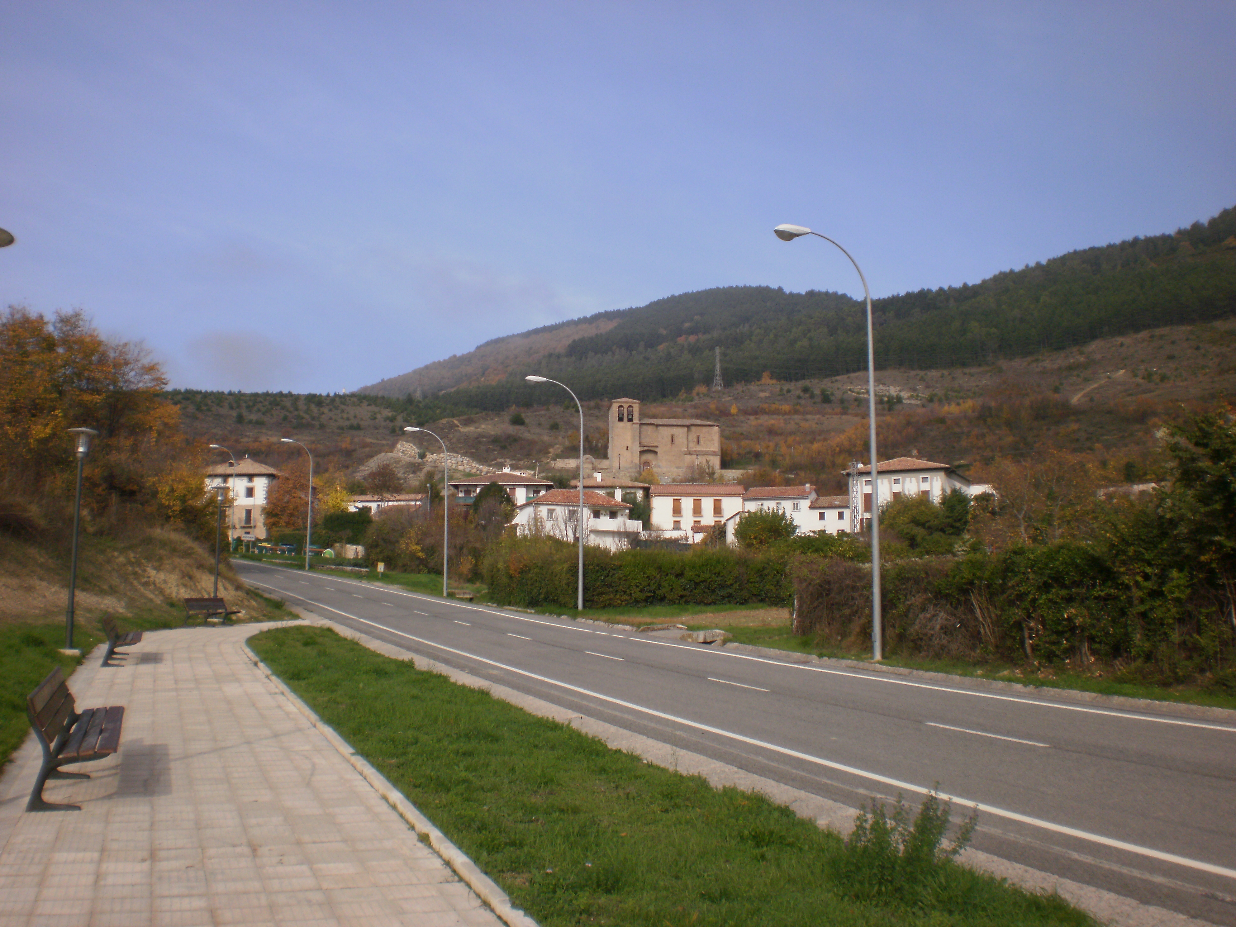 Vista general del Casco Viejo de Ansoáin